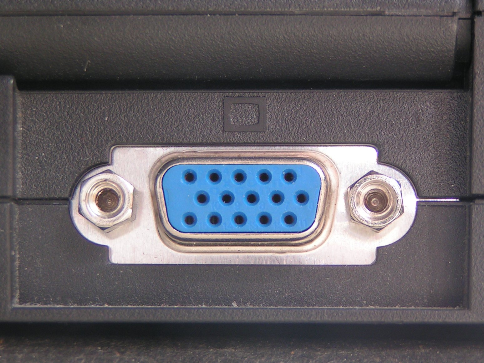 SVGA computer port